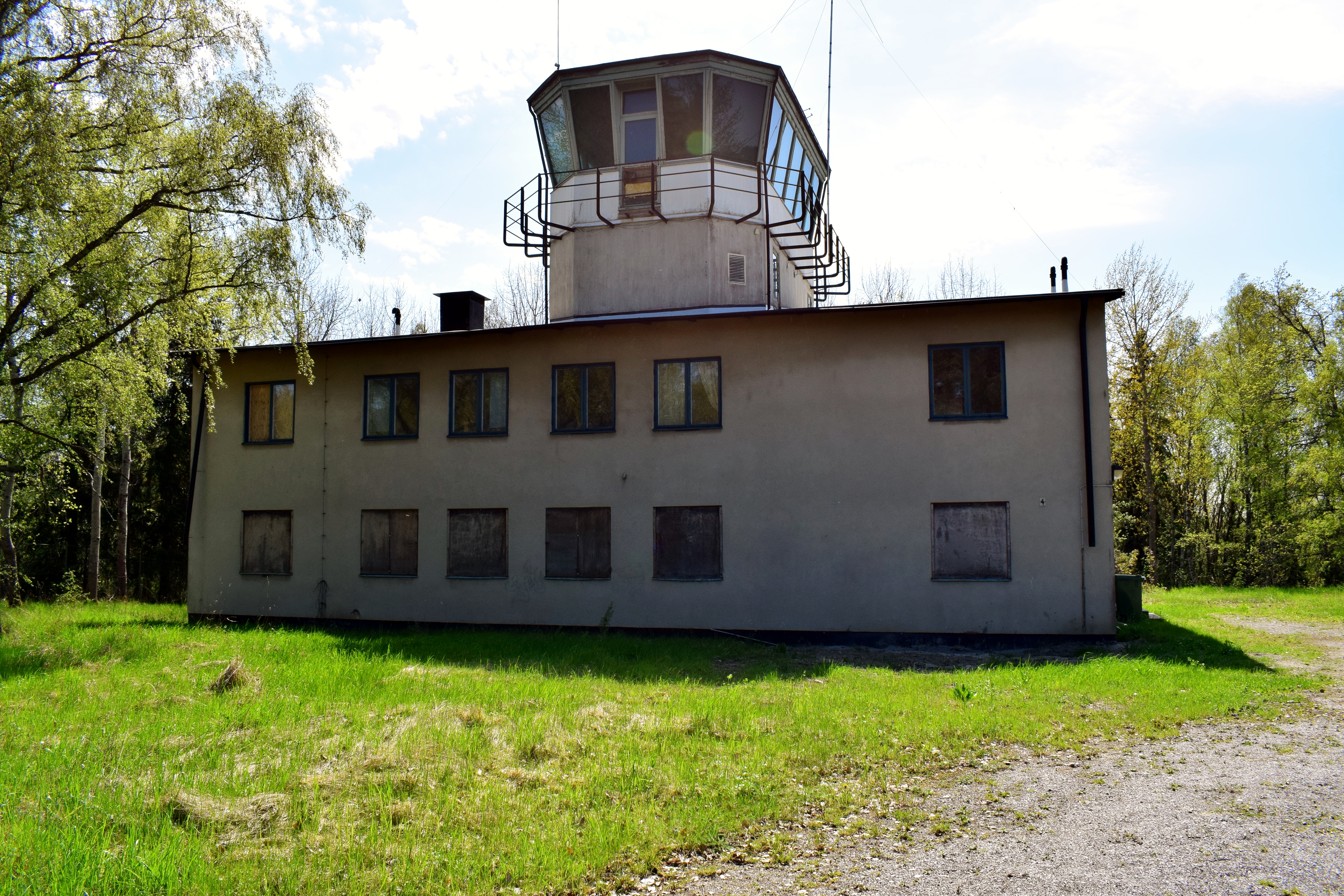 Trafikledartornet vid flygbasen. På bottenvåningen huserade signalavdelningen, andra våningen låg väderavdelningen, och i tornet huserade flygtrafikavdelningen.